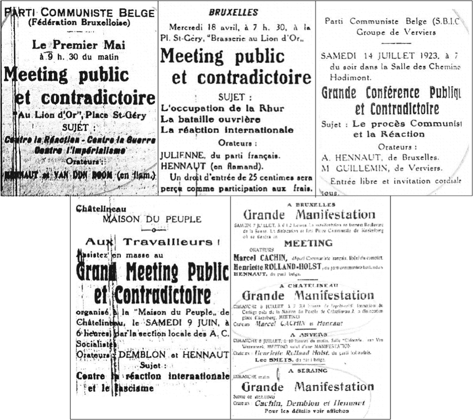 Annonces de meetings, Extraits du Drapeau Rouge du 14 et 28 avril, du 2 juin et du 7 et 14 juillet 1923